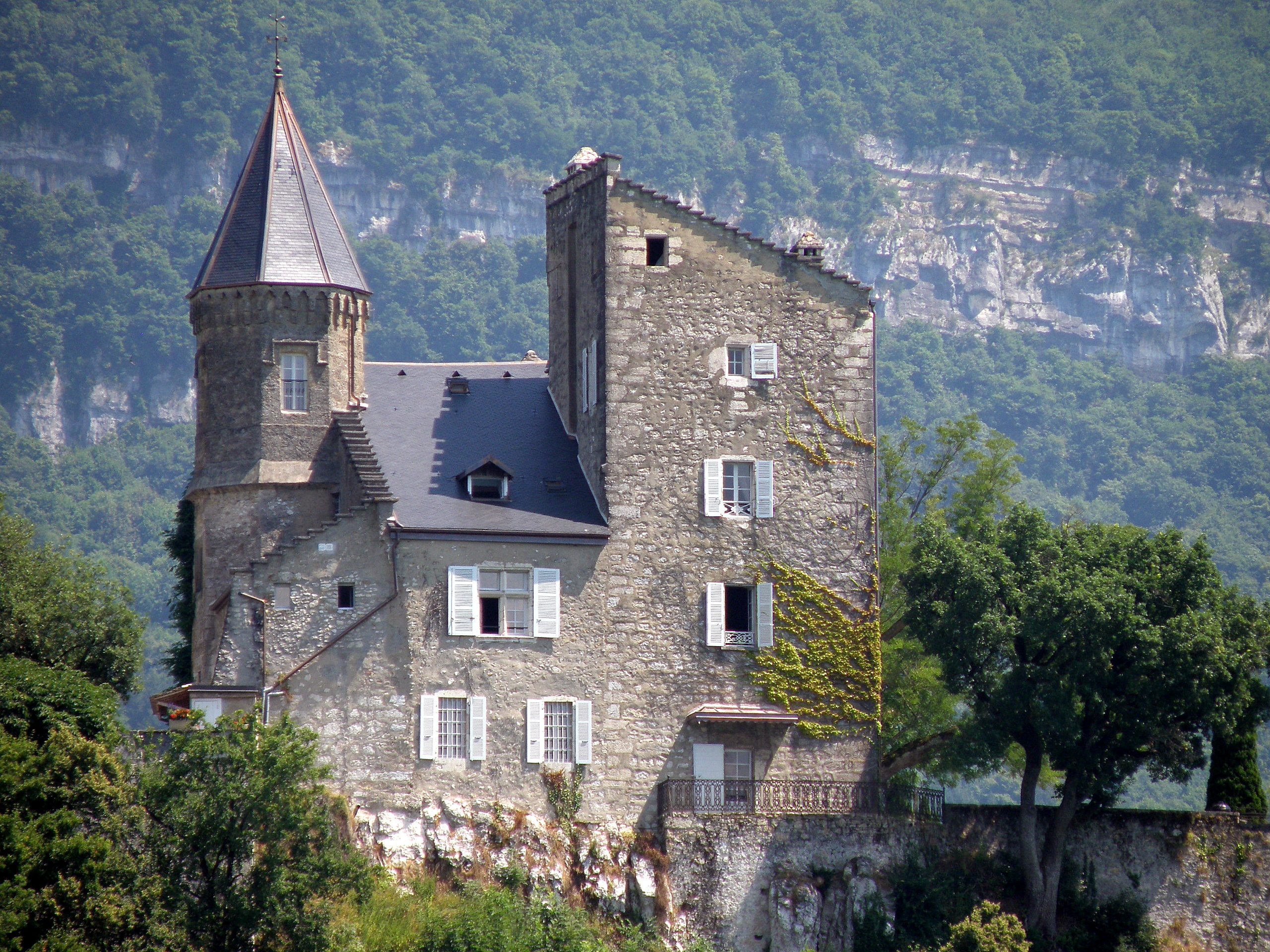 Chindrieux, comm. du département de la Savoie (région Rhône-Alpes, France). Le château de Châtillon, dans le village homonyme, au bord du lac du Bourget.